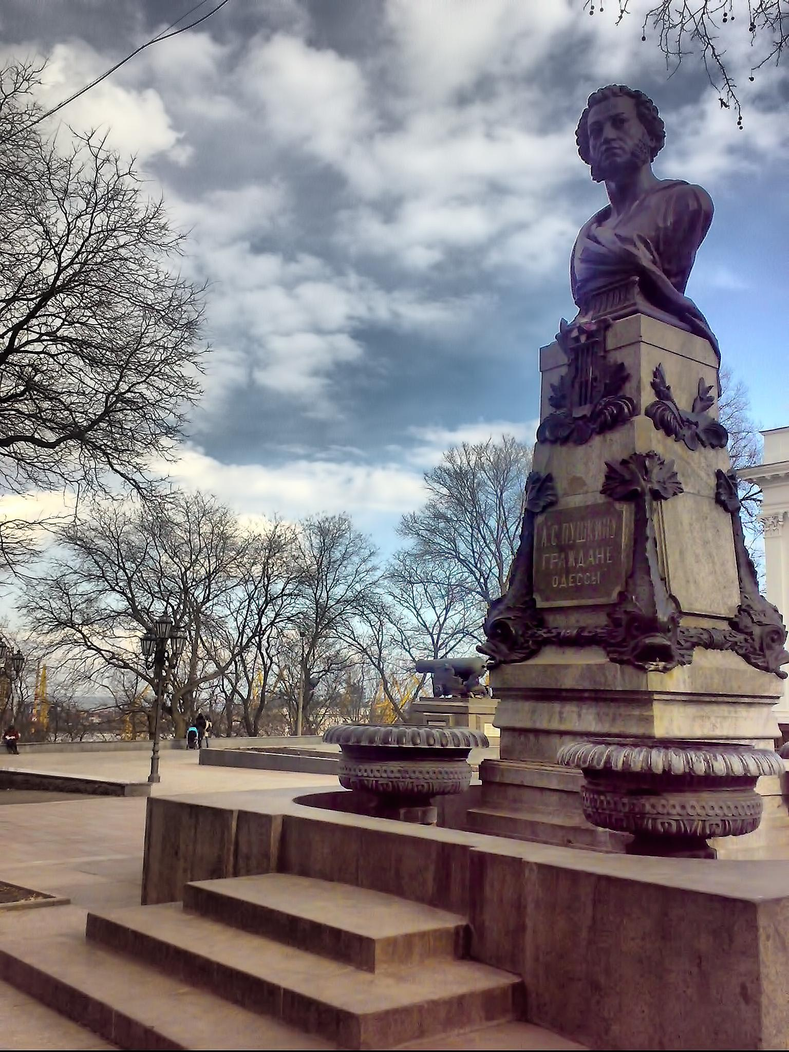 Пам’ятник поету О.С. Пушкіну, Одеса, Приморський бул.